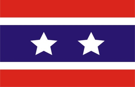 Bandeira do município de Medianeira, Paraná, Brasil.